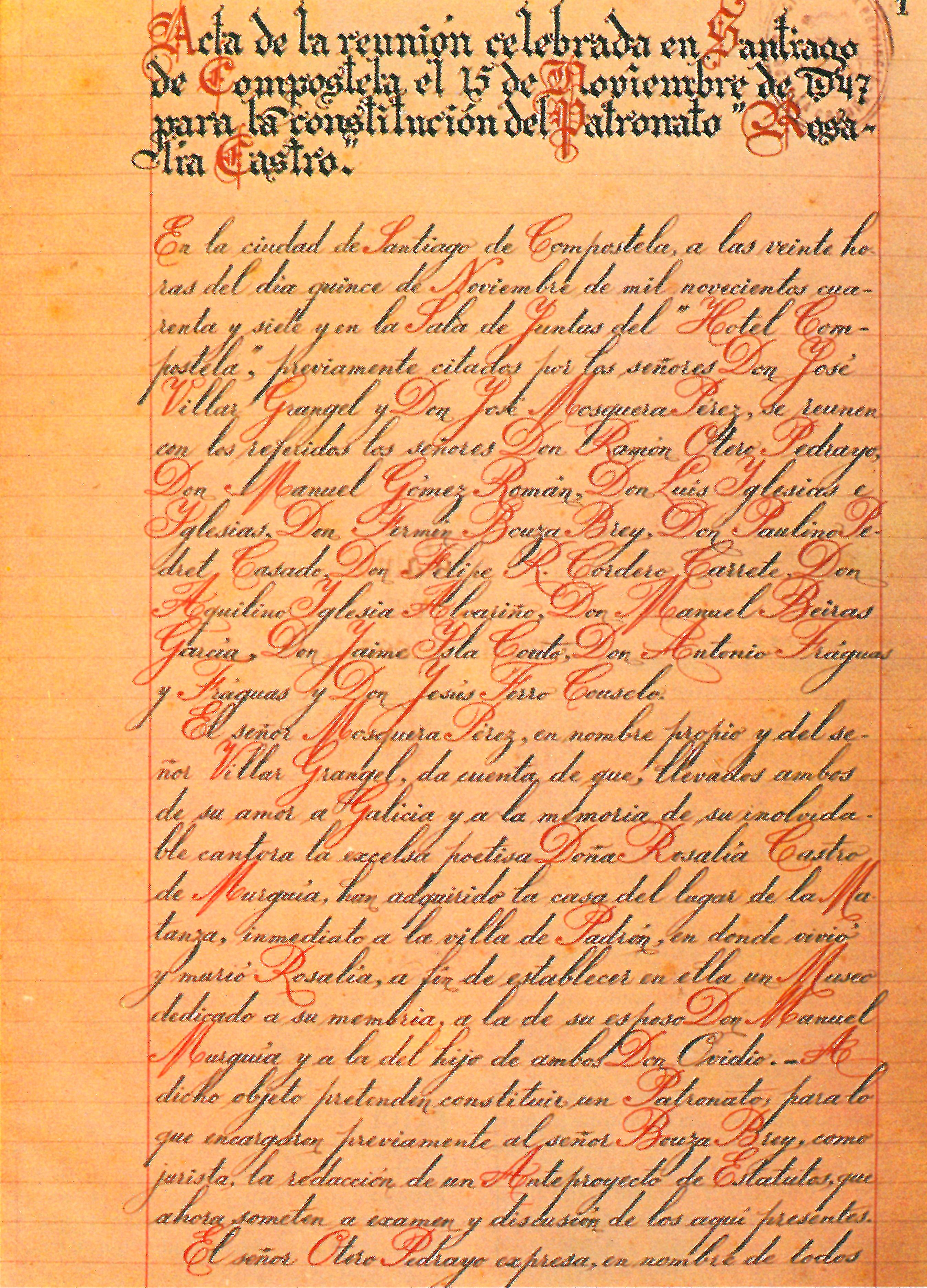 Primeira páxina do Libro de Actas do Patronato Rosalía de Castro.